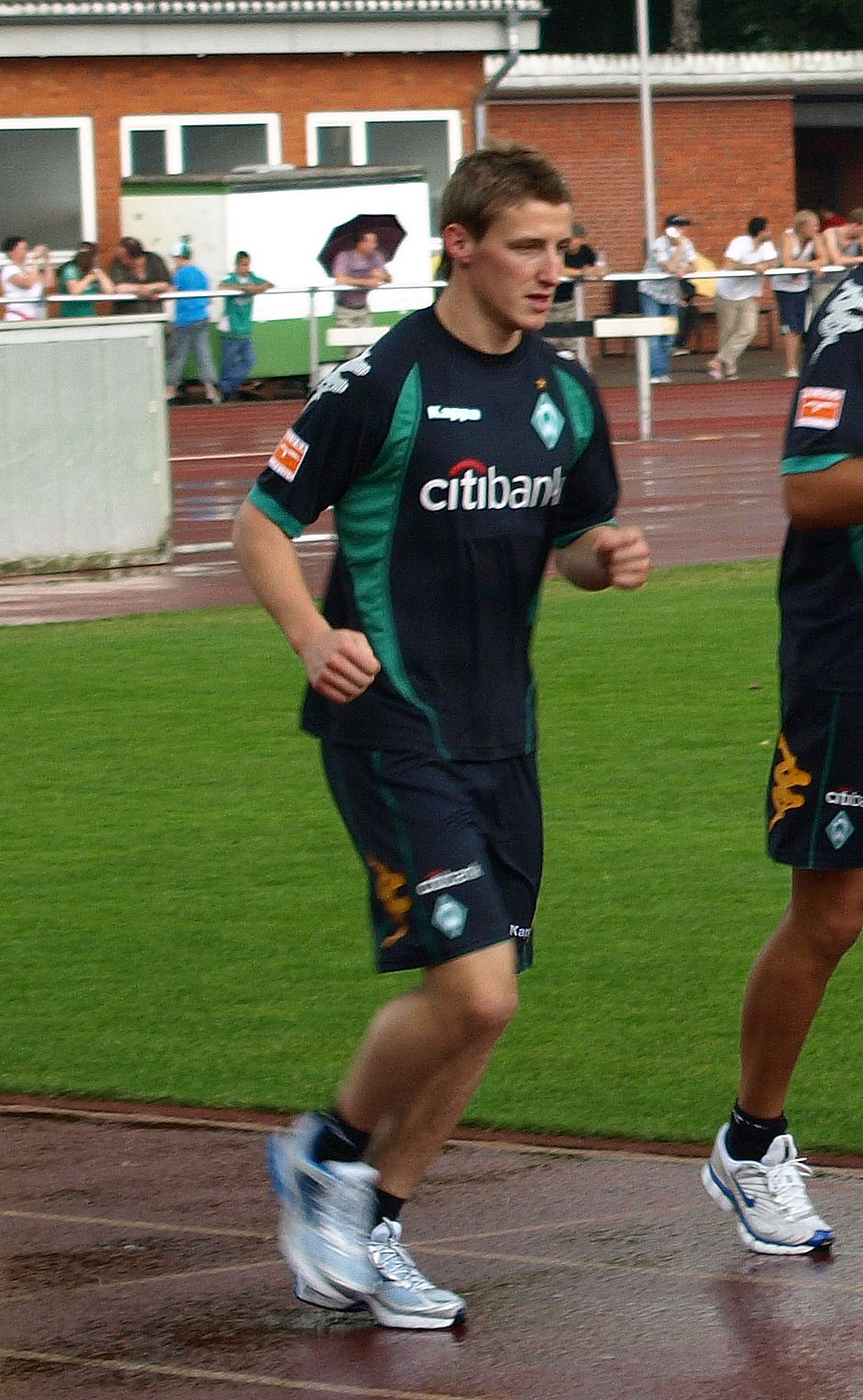 Said Huseinović beim Trainingsauftakt von Werder Bremen 2008 (Laktattest)